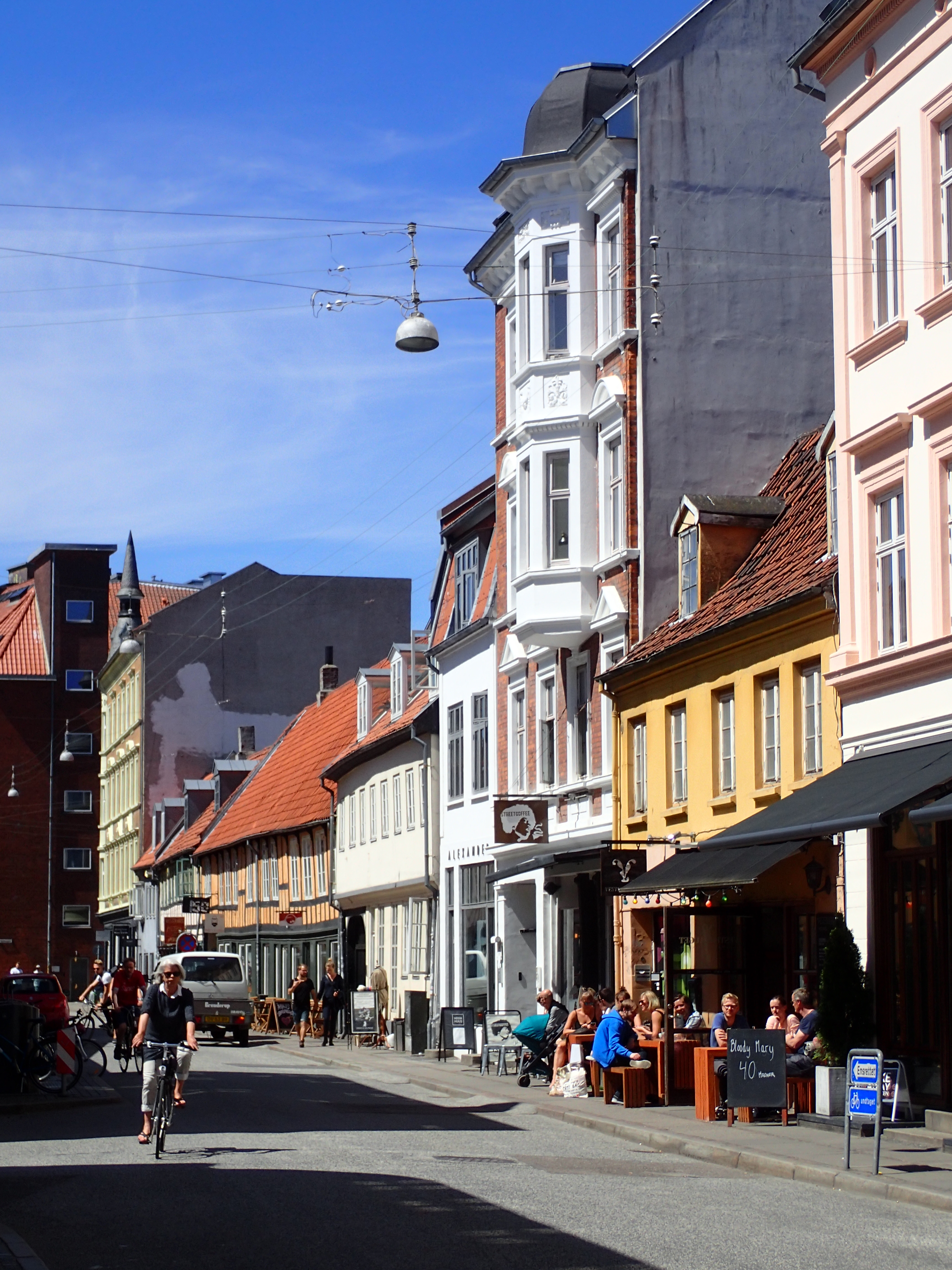 Vestergade i Aarhus.